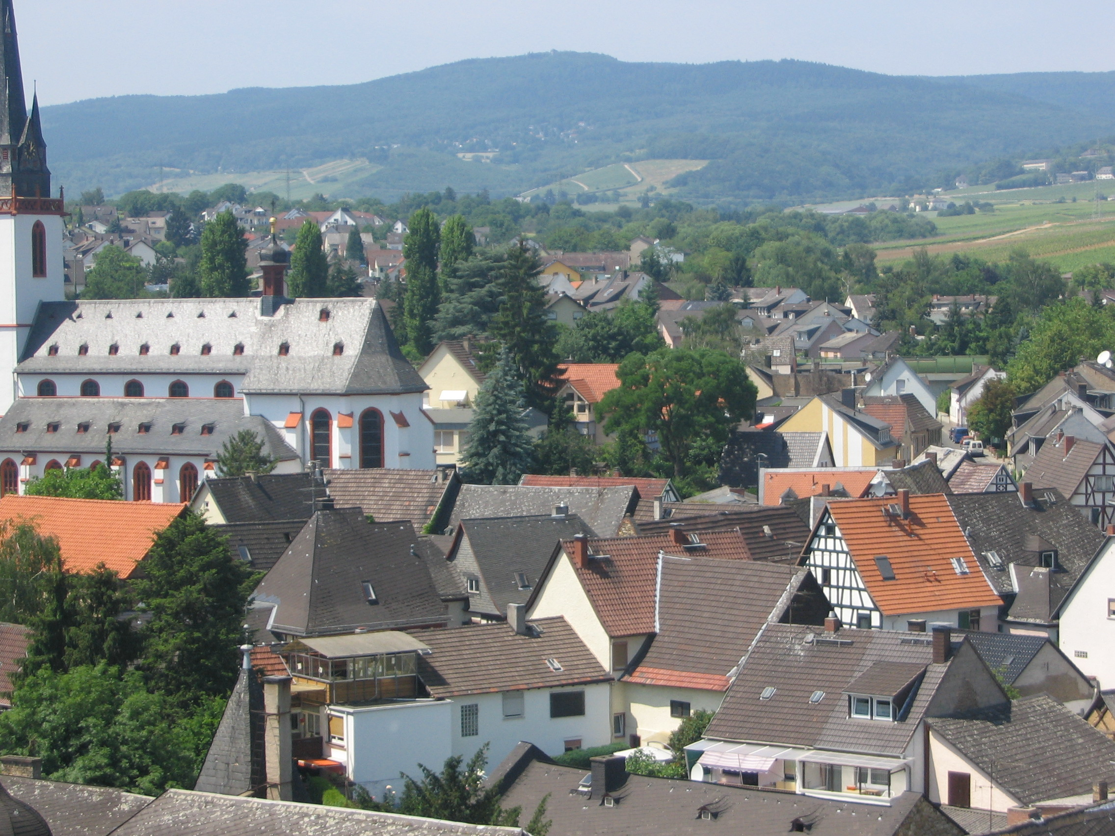 Blick über Erbach im Rheingau mit katholischer Pfarrkirche Sankt Markus zur Hallgarter Zange im Taunus